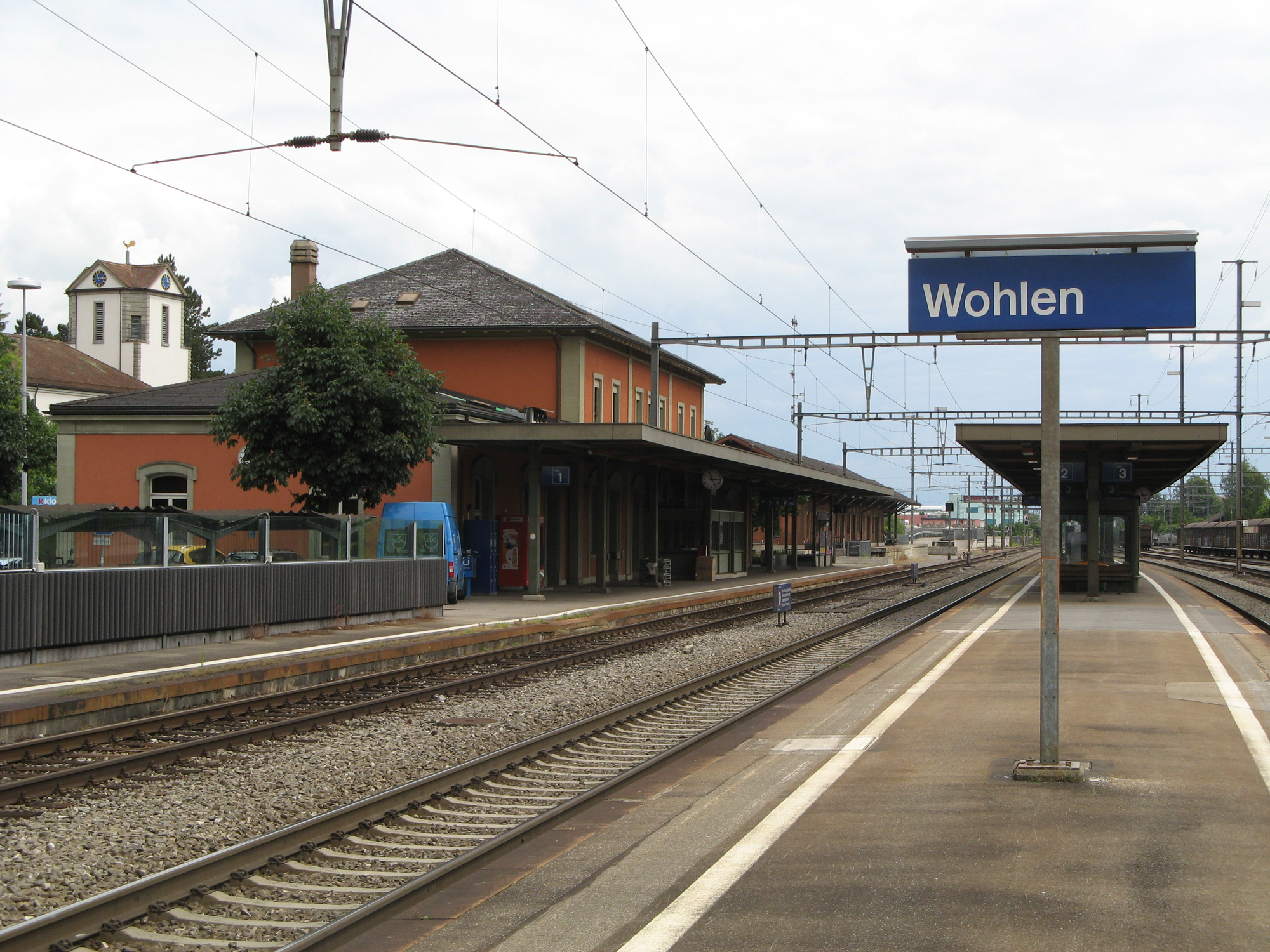 Bahnhof Wohlen, vom Mittelperron aus gesehen, links hinten reformierte Kirche